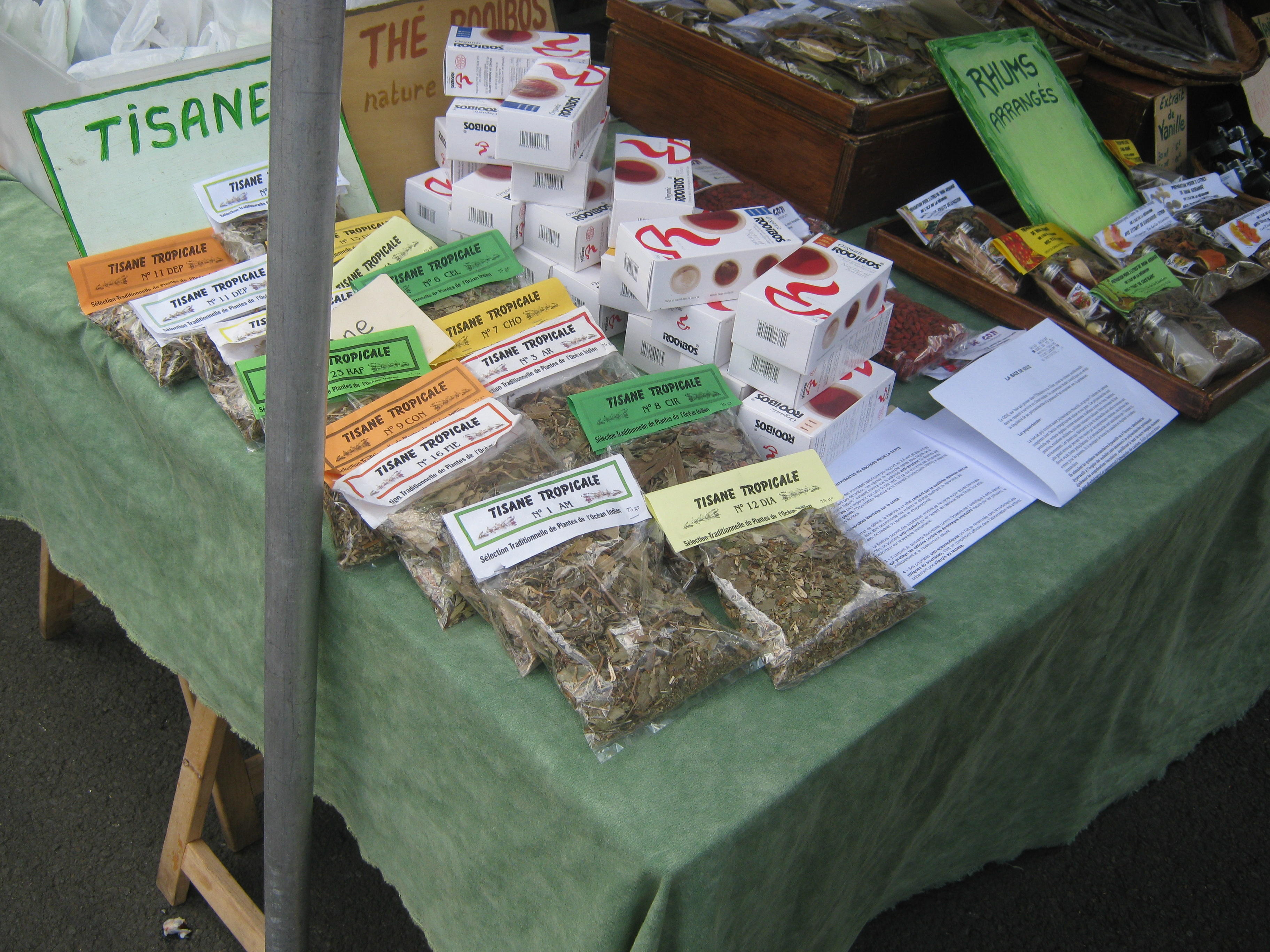 Ce stand montre différents extraits de plantes qui servent à faire les tisanes.